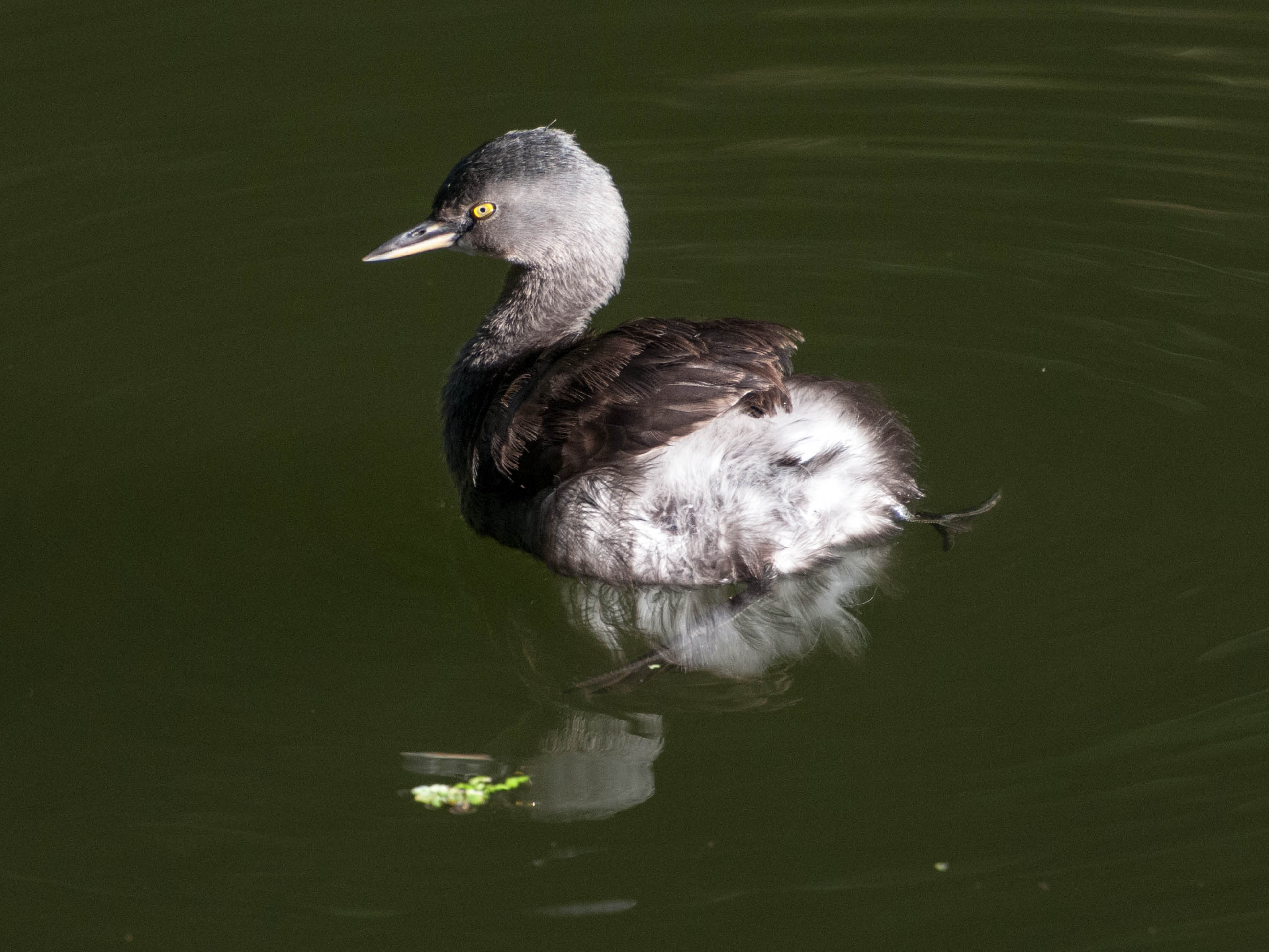 Least Grebe Tachybaptus dominicus; Nanciyaga, Catemaco, Veracruz, Mexico